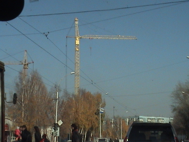 Краны КБ-503Б и КБ-403А - на строительстве жилого дома Блюхера 71б - Новосибирск